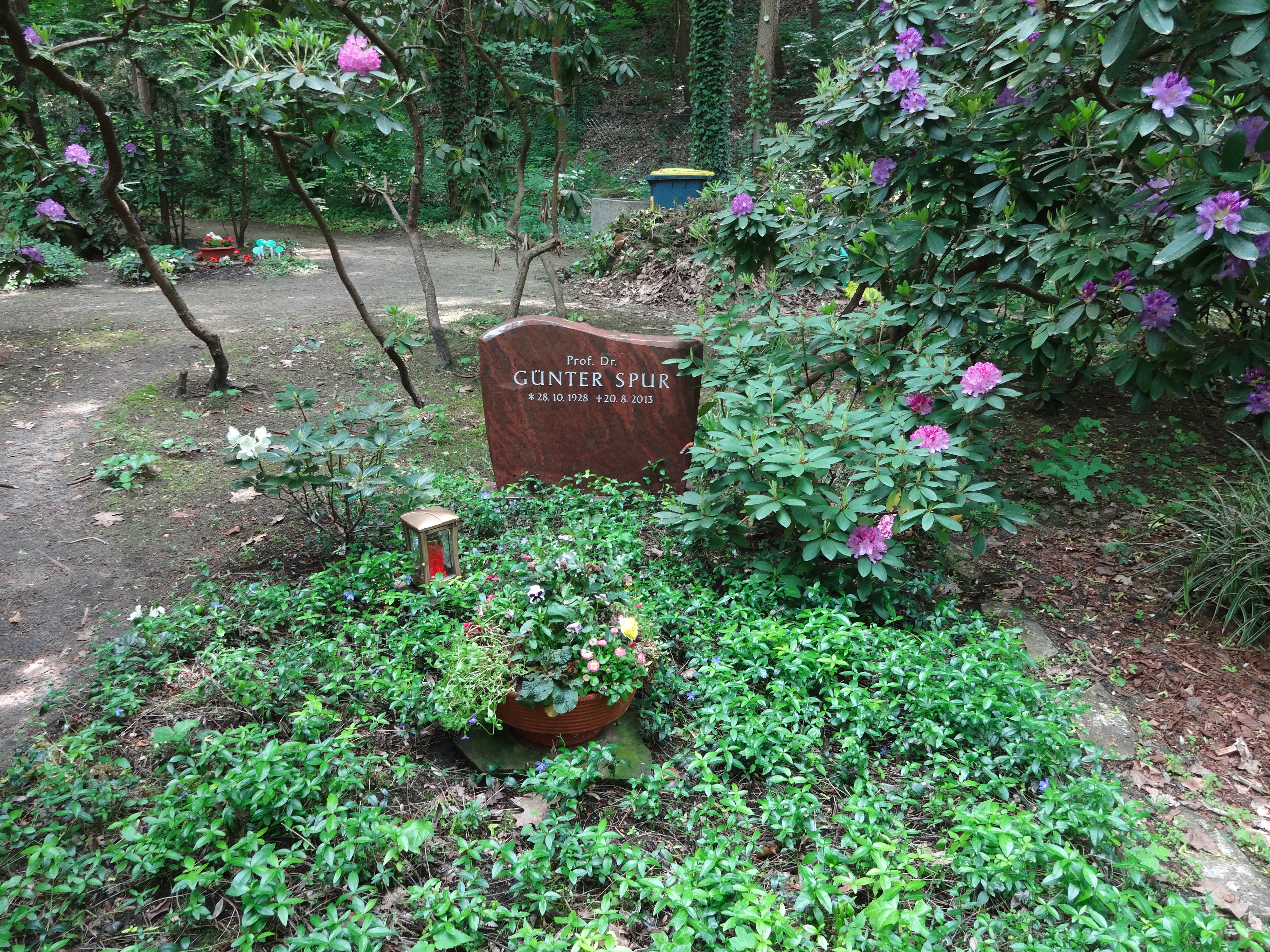 Grab von Prof. auf dem Friedhof Heerstraße in Berlin